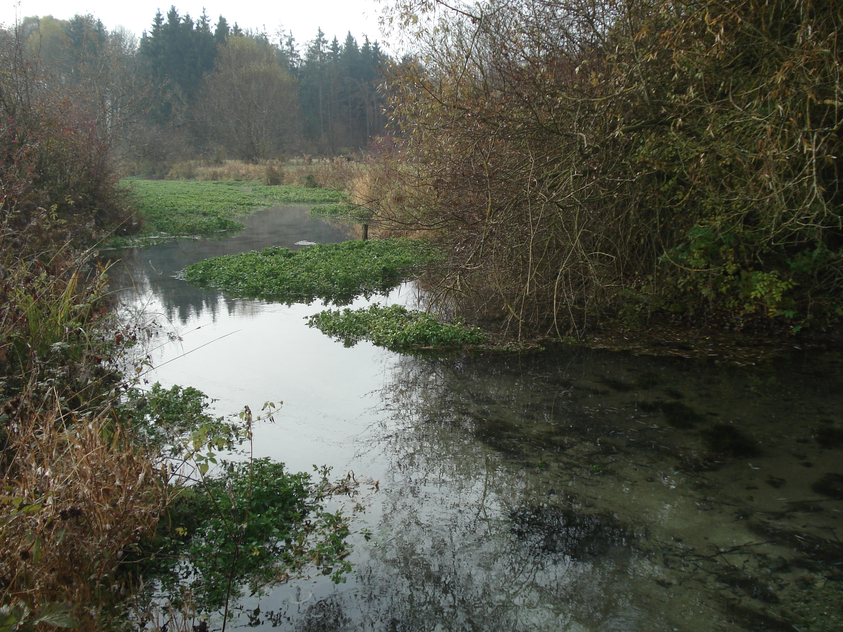 Der abfließende Bach der Gallengehrenquelle (Flussabwärts!)